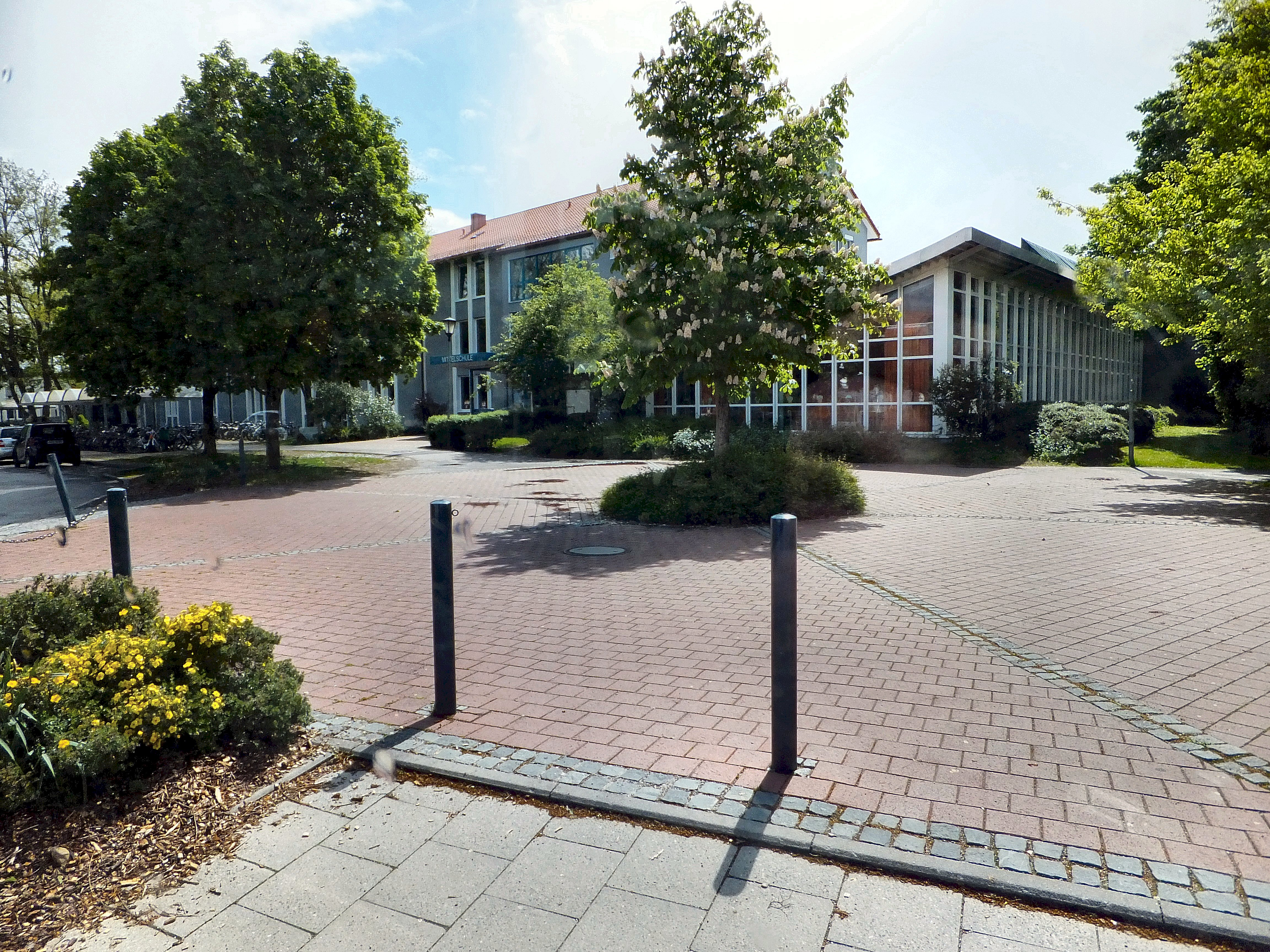 Unterschleißheim (Lohhof), Mittelschule an der Johann-Schmid-Str. - 2